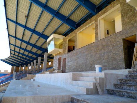 تطوير الملعب